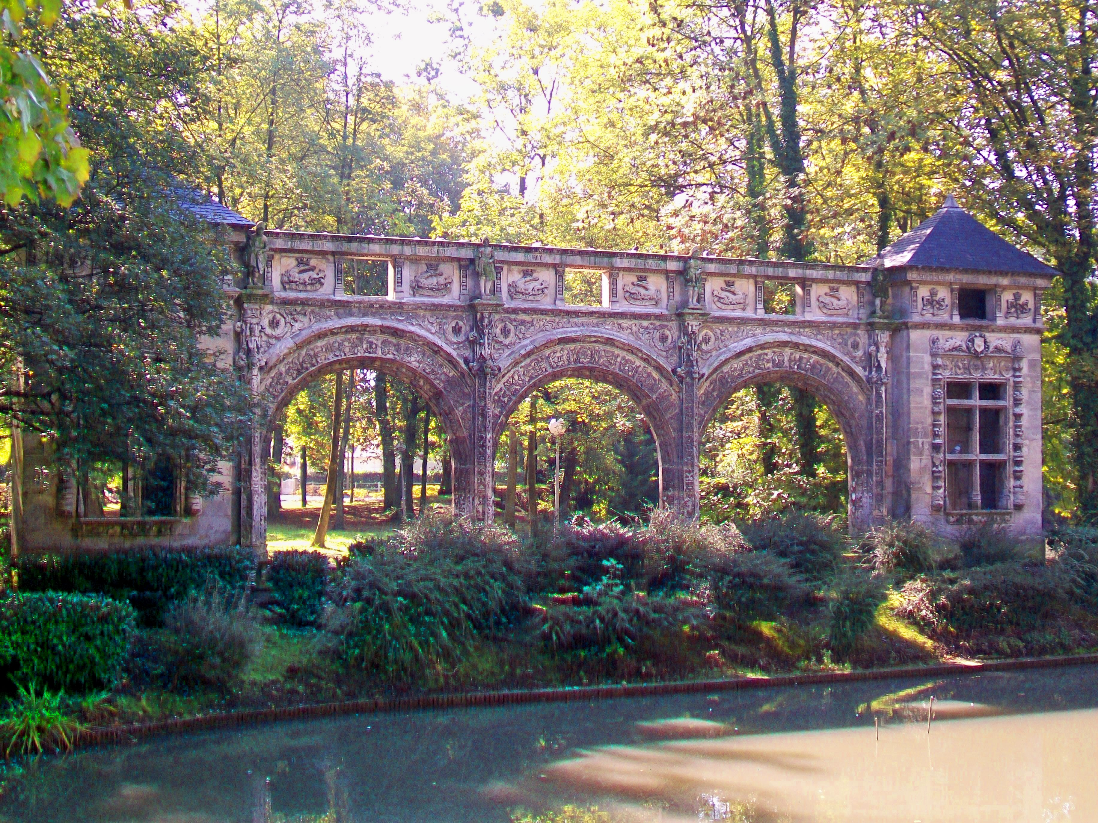 Façade du château de Sarcus, au parc Hébert. Le château a été démoli en 1835 et la façade déplacée ici, pour l'incorporer dans une grande maison bourgeoise. Cette dernière a elle aussi été démolie vers 1965/70, et la façade déplacée une seconde fois, mais de quelques dizaines de mètres seulement.